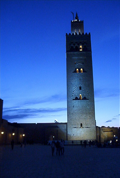 La Koutoubia à Marrakech au coucher du soleil